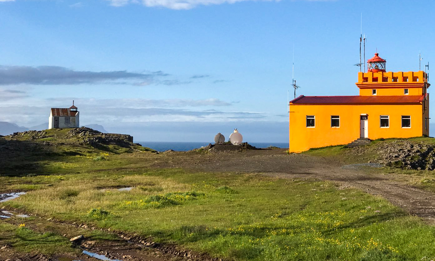 Links der ältere Leuchtturm, rechts der neue, noch in Betrieb befindliche.